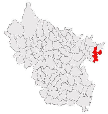 Categorie:Hărţi ale judeţului Buzău